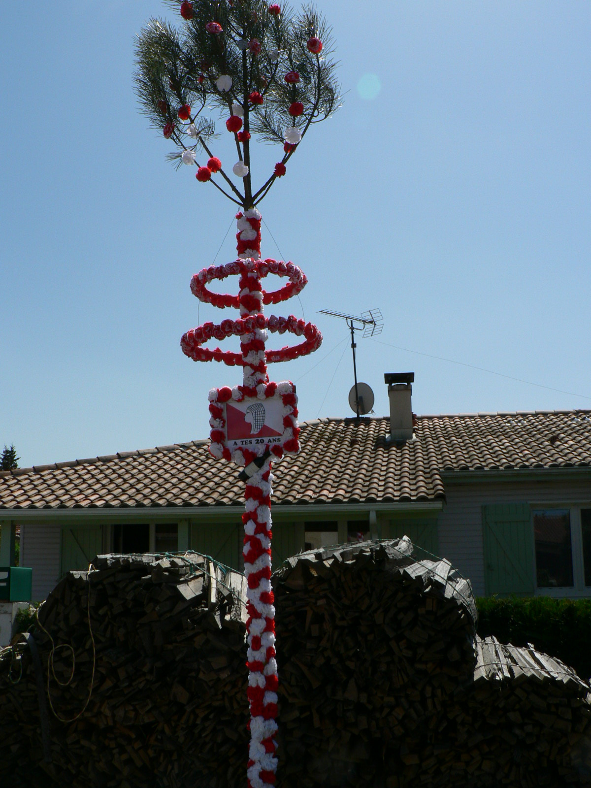 Mai Gascon de la traditionnelle maïade.